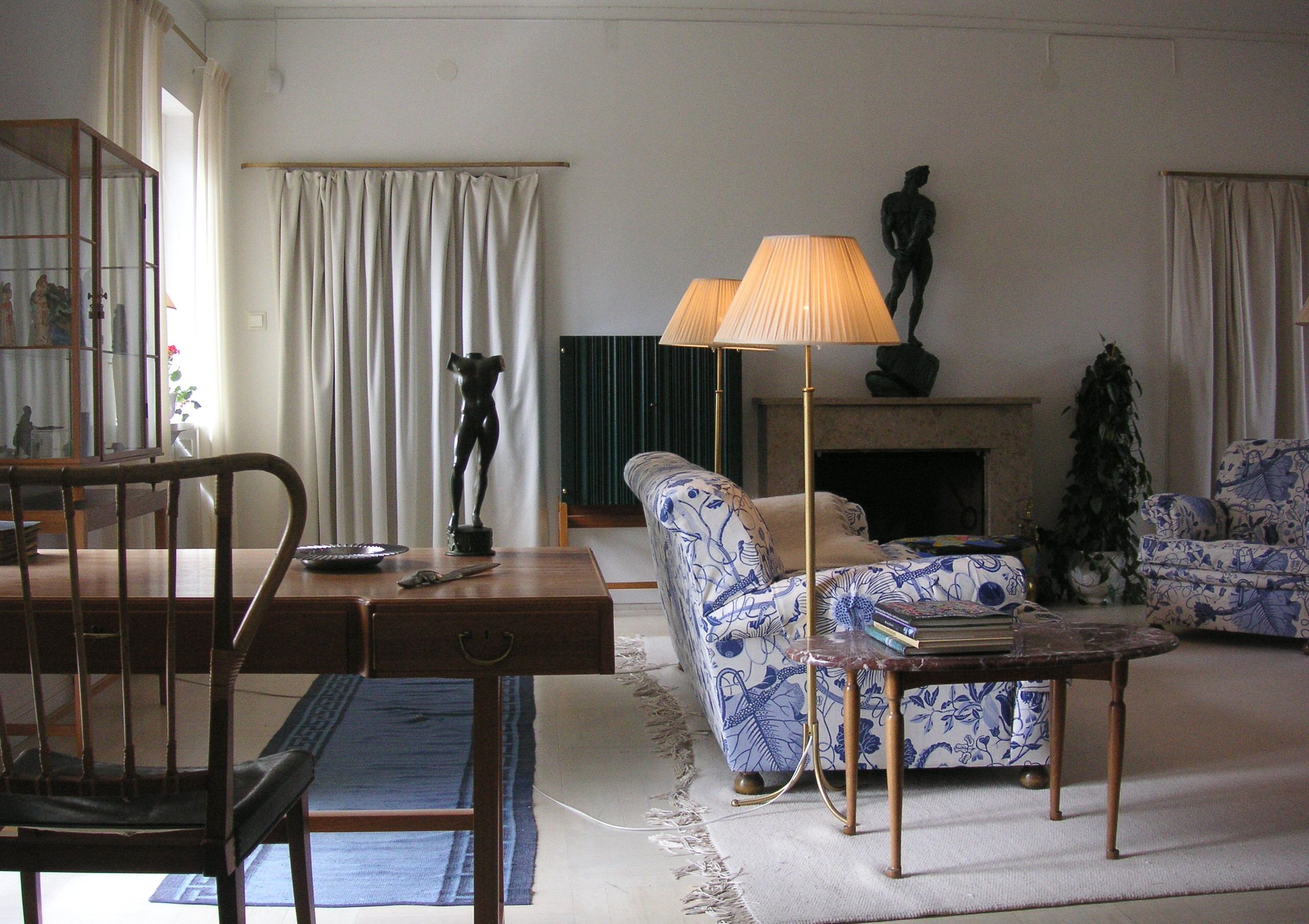 Millesgården på Lidingö, Annes hus, vardagsrummet